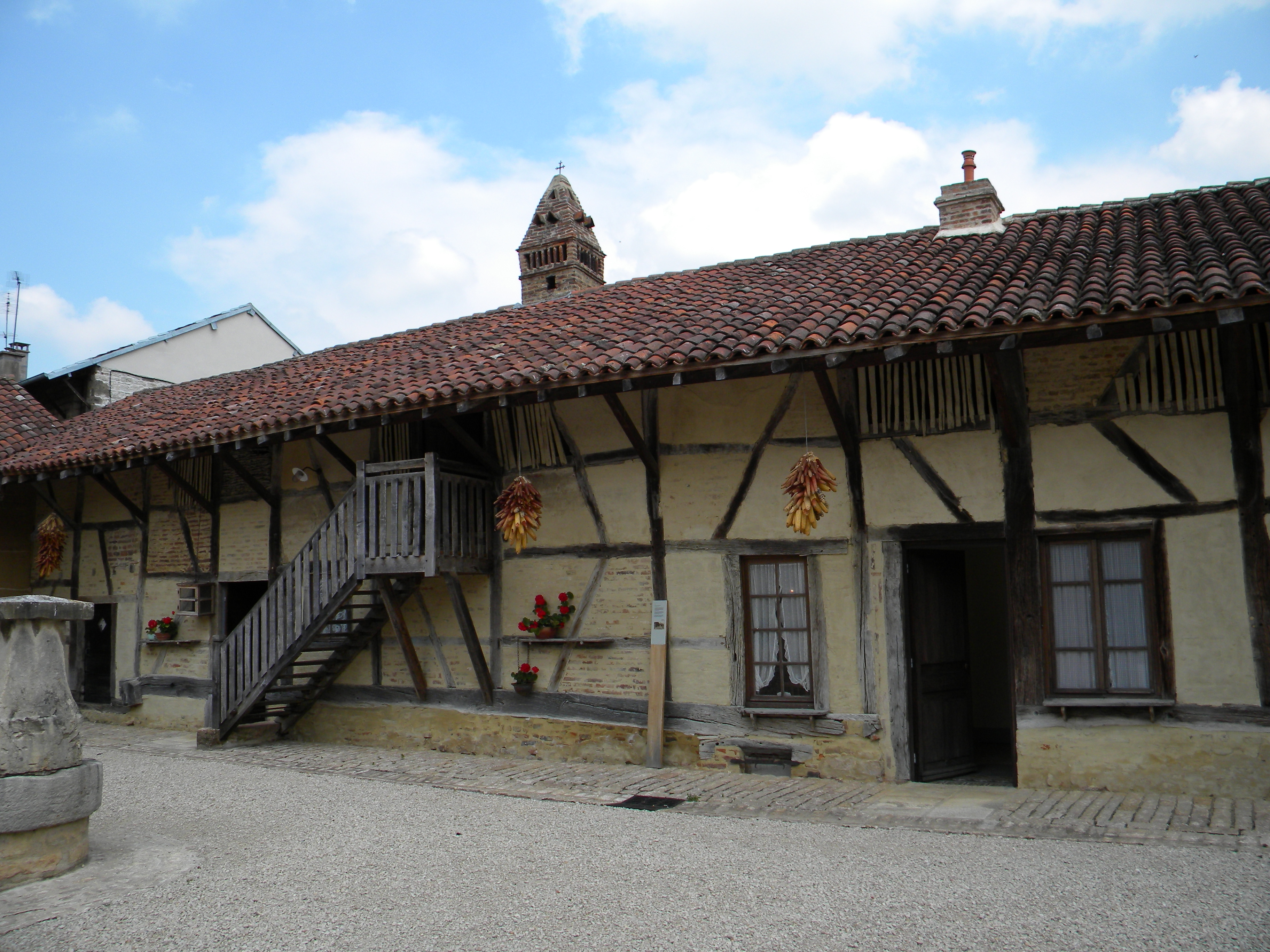 Muzeo